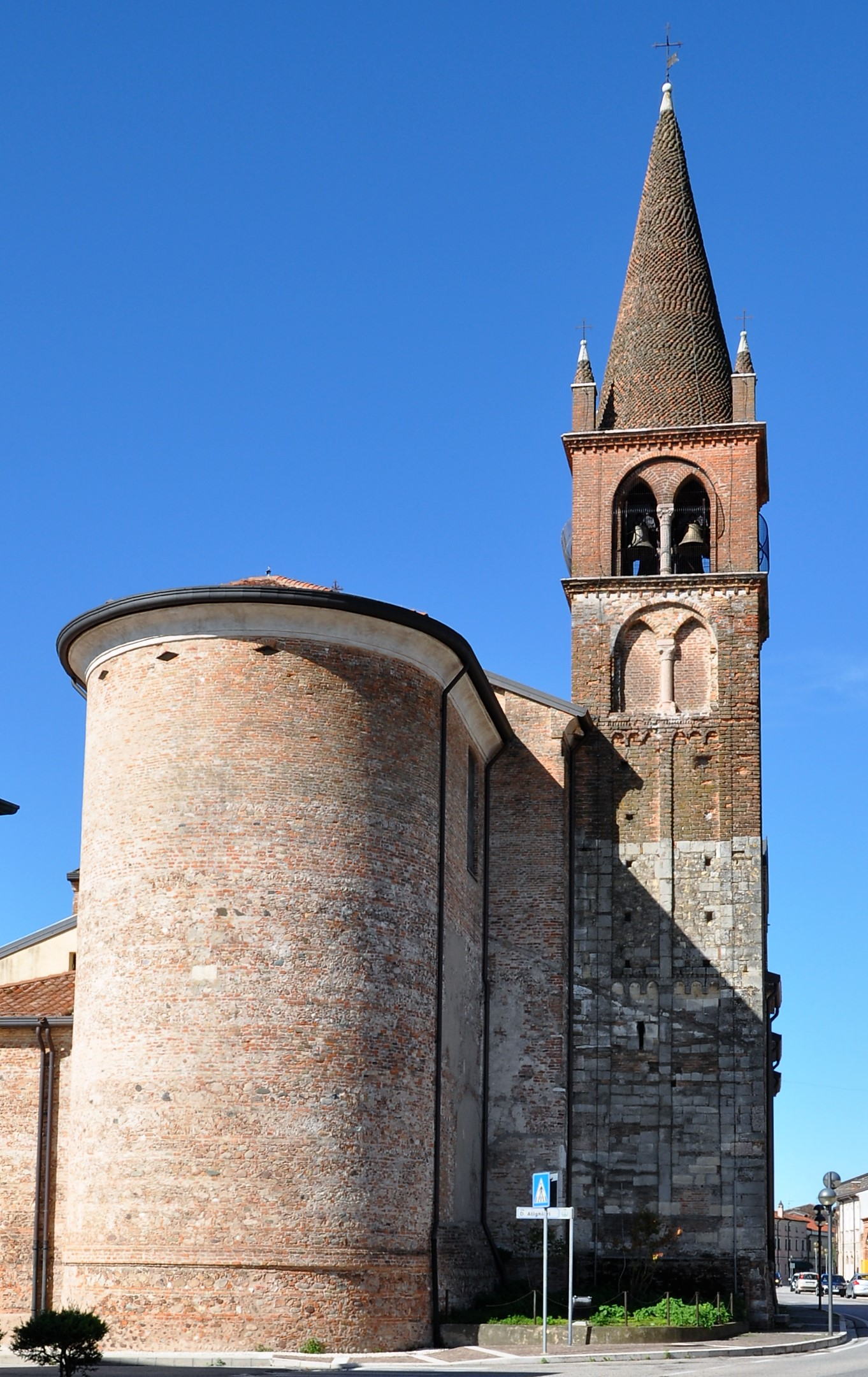 Chiesa antichissima, citata già nel dodicesimo secolo, infatti a confermare la sua antichità rimane l'imponente campanile. Una rarità medievale da non lasciarsi sfuggire. This is a photo of a monument which is part of cultural heritage of Italy.